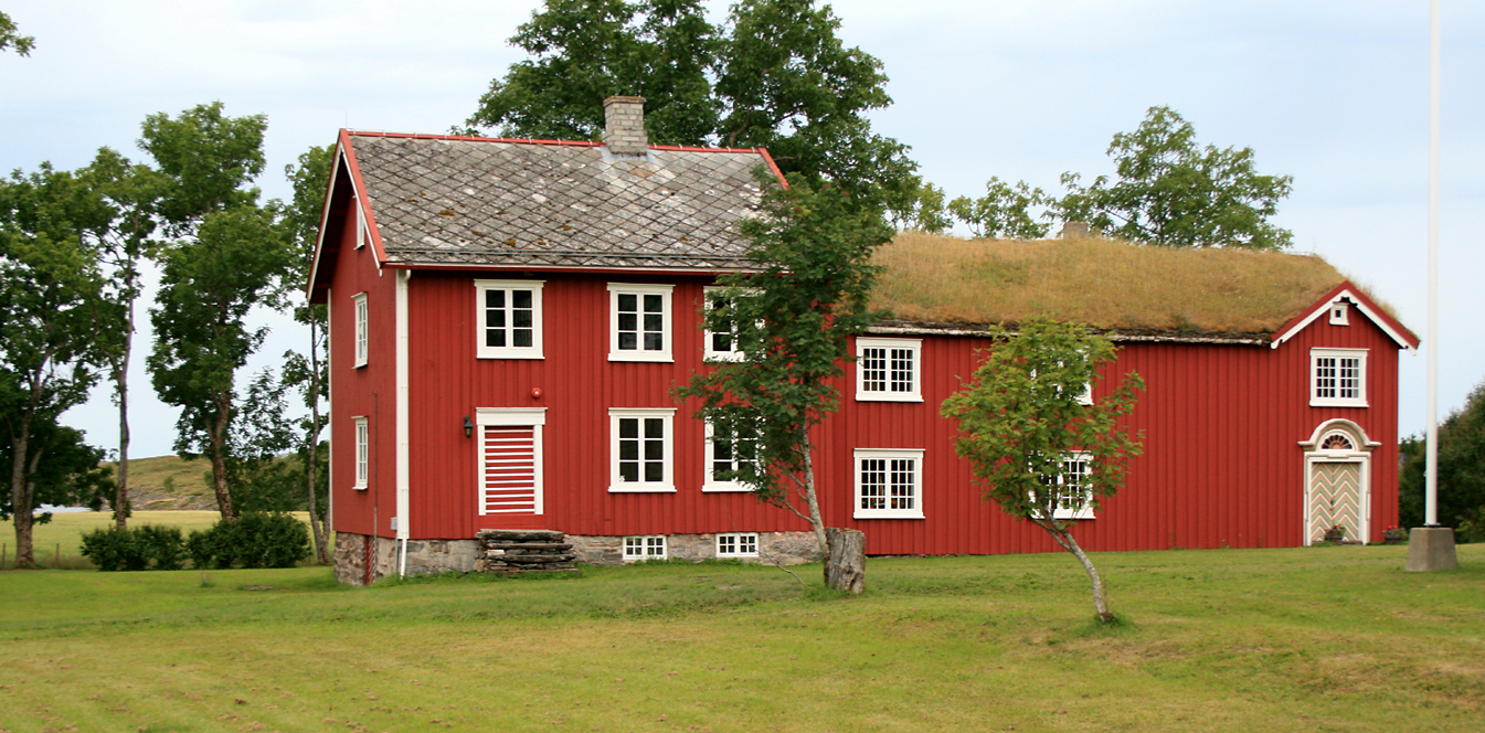 Alstahaug prestegard, Nordland. Freda.